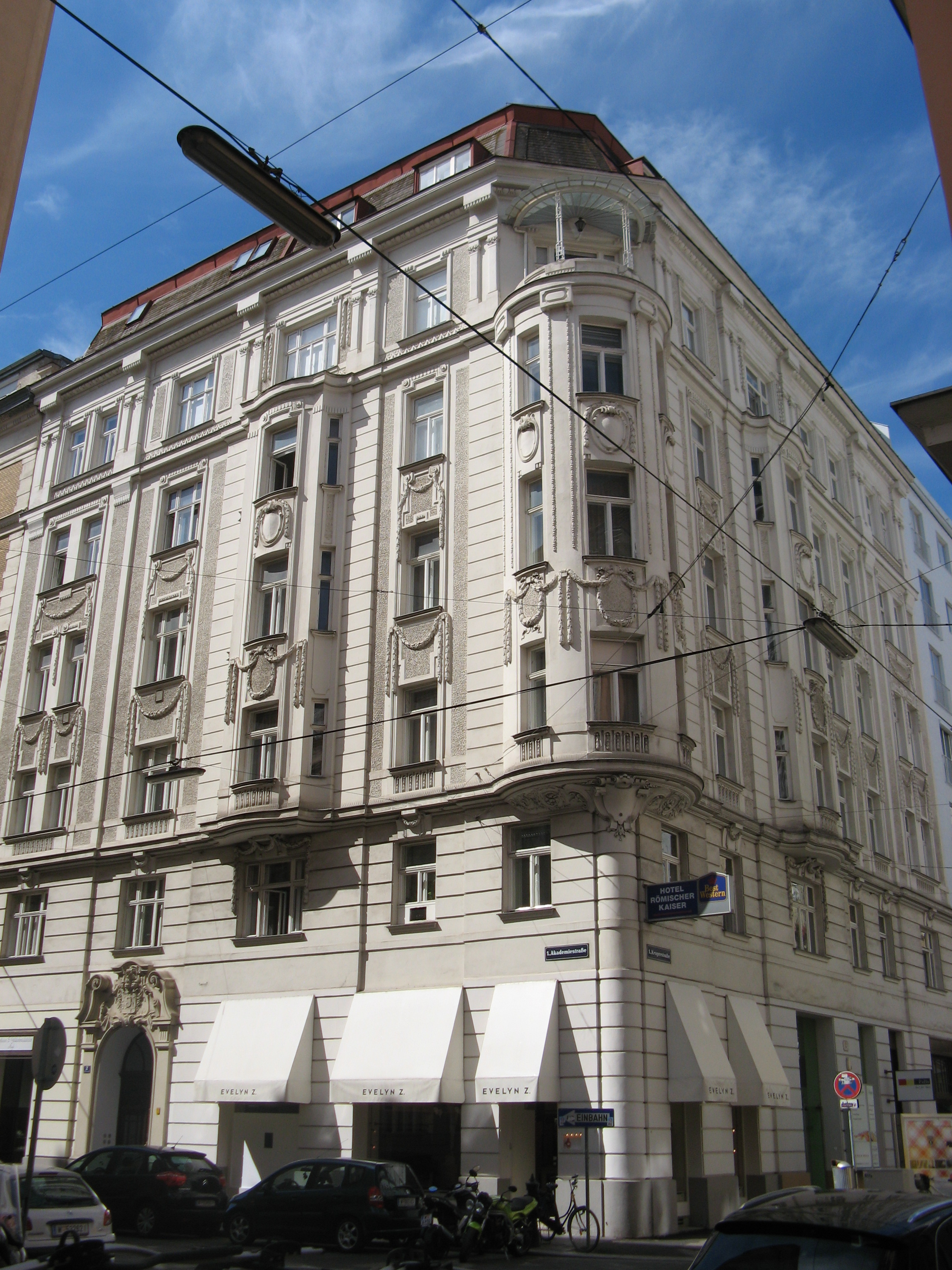 Späthistoristisches Eckhaus von Alfred Rothermann (1908-09), Akademiestraße 2, Wien-Innere Stadt